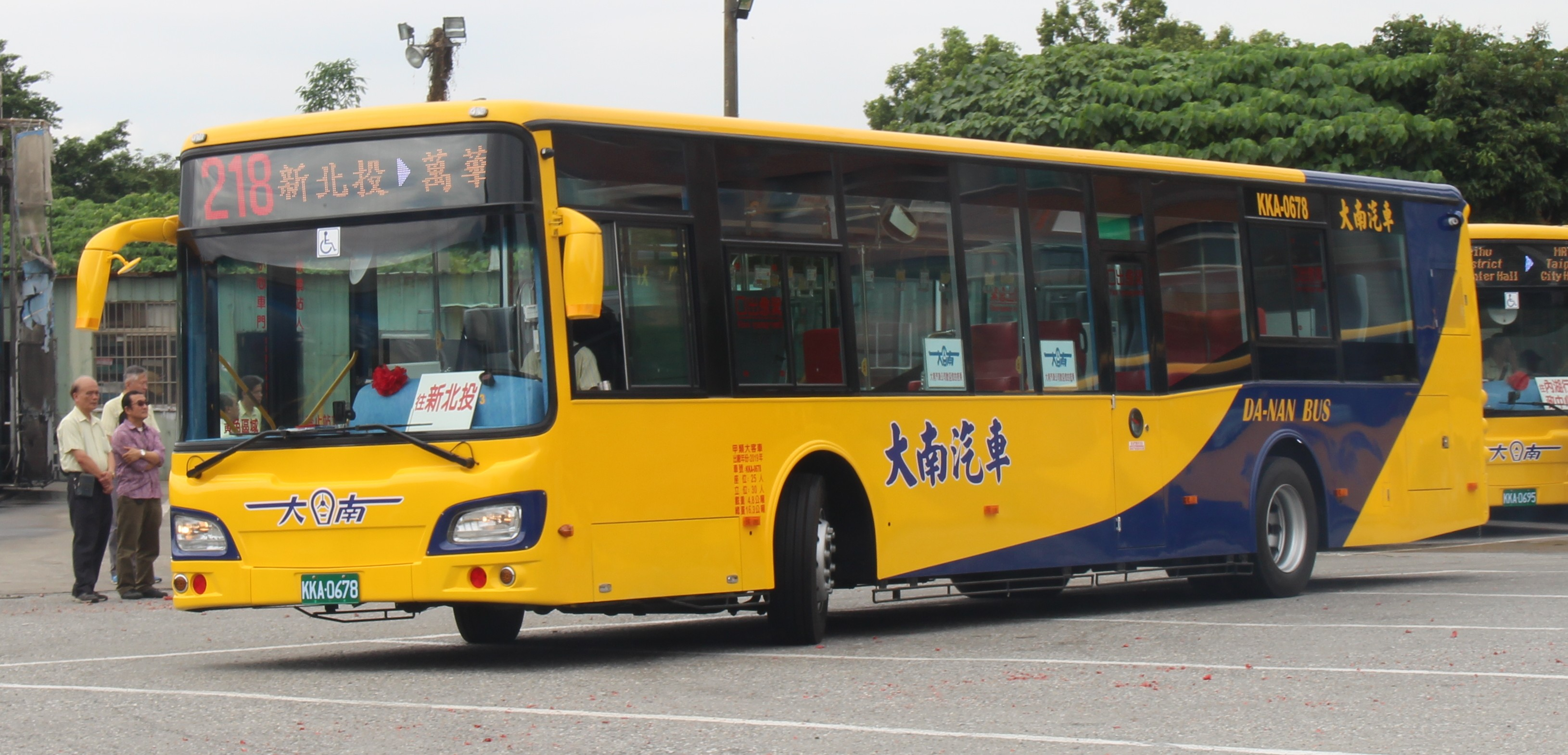 大南汽車 2019 HINO HS8JRVL KKA-0678